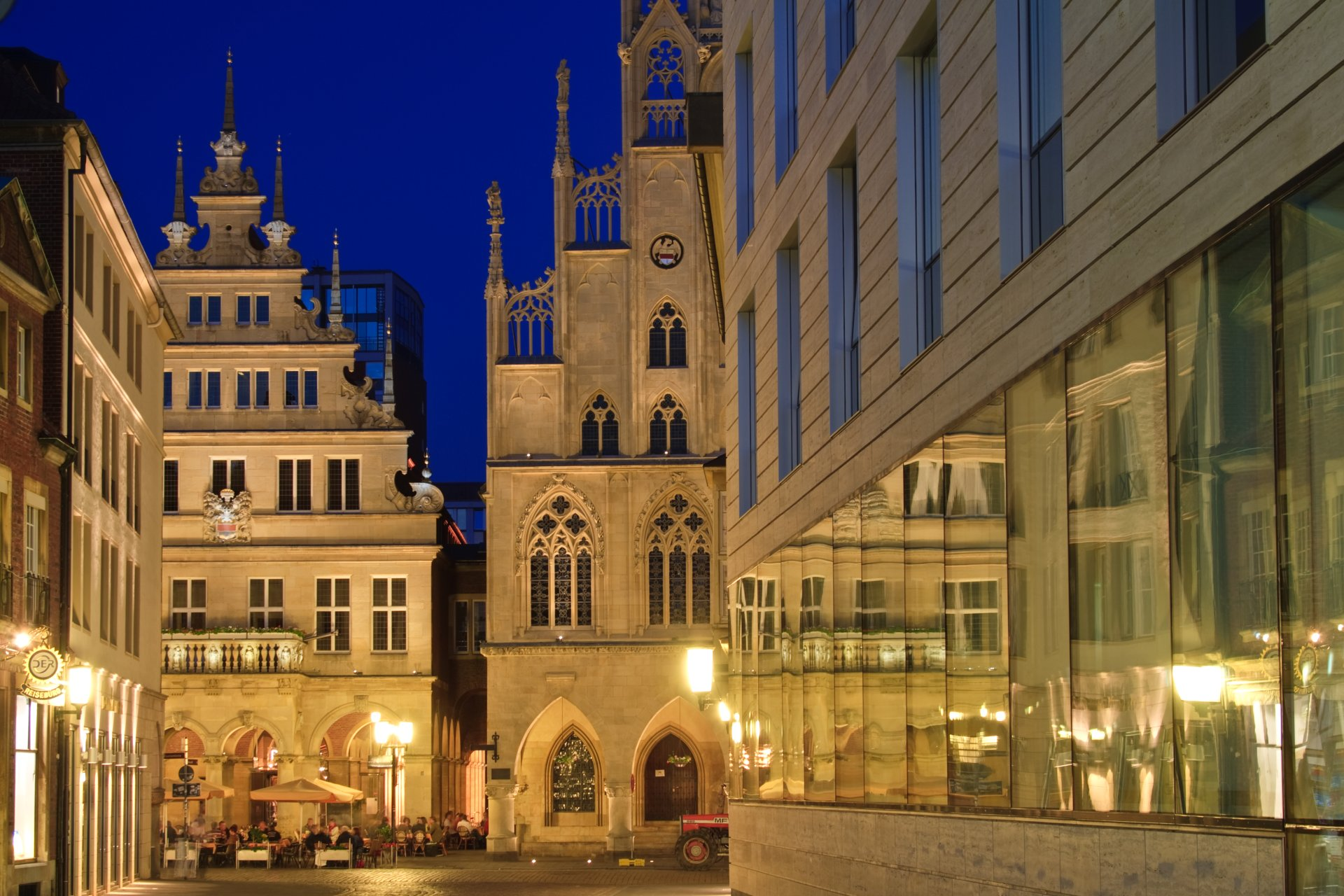 Moderne und historische Architektur gehen in Münster Hand in Hand. Rechts die Bezirksregierung, geradeaus das historische Rathaus.